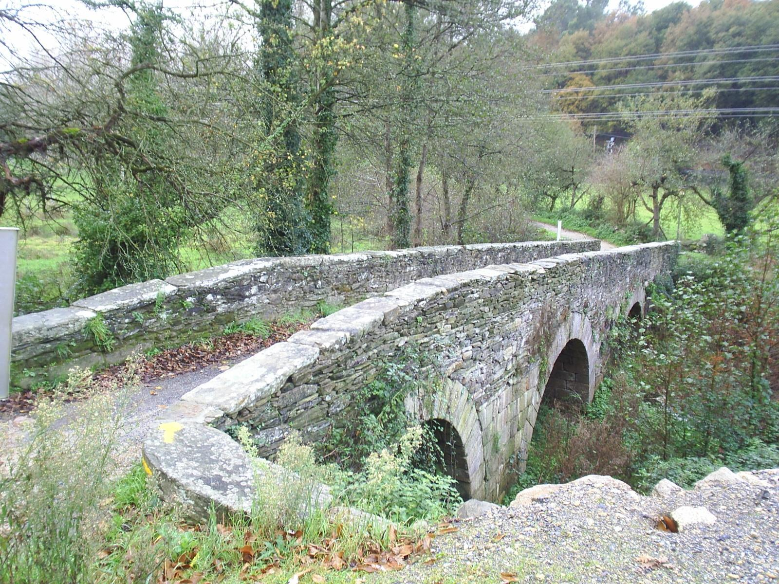 Ponte da Aspera sobre el río Celeiro en la localidad de Sarria (Lugo, España).